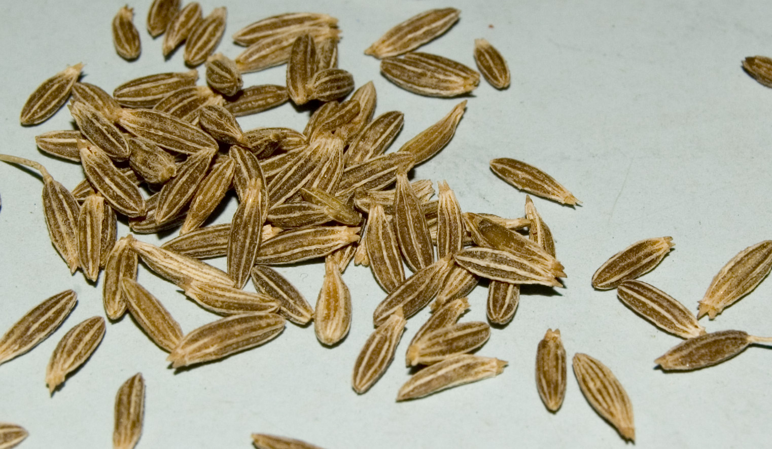 Jeera Seeds Close Up